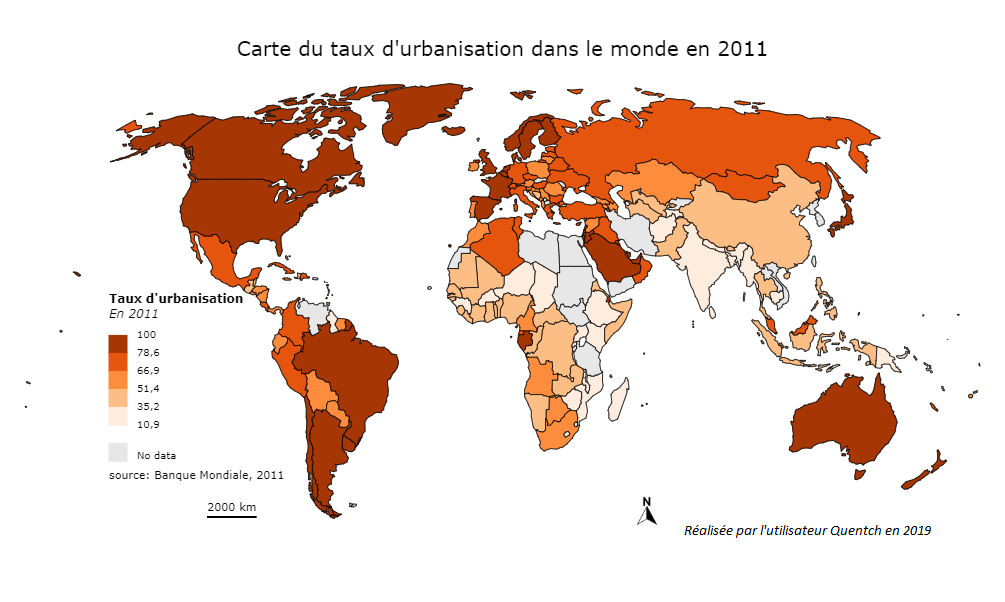 Discrétisation du taux d'urbaniation en quantile. Les pays en gris n'ont pas de données.